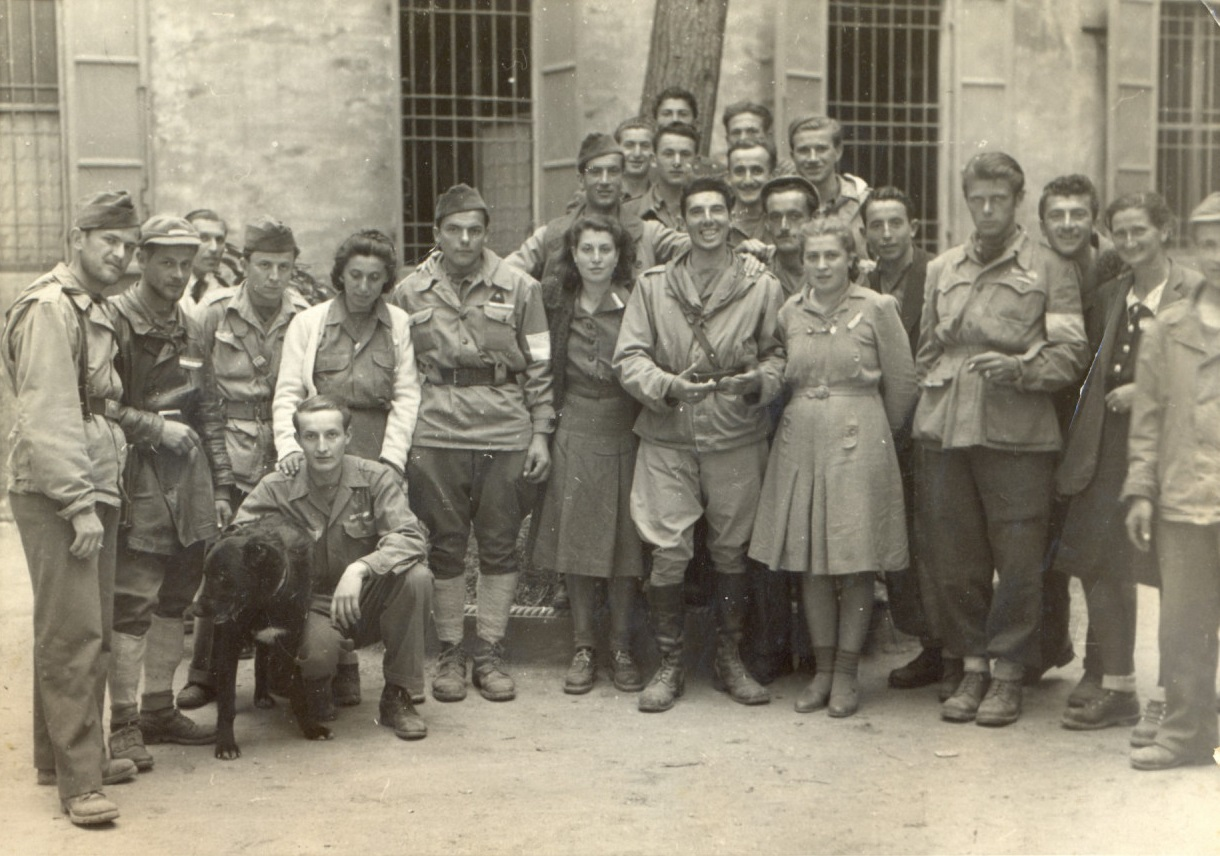 Partigiani della Brigata Italia